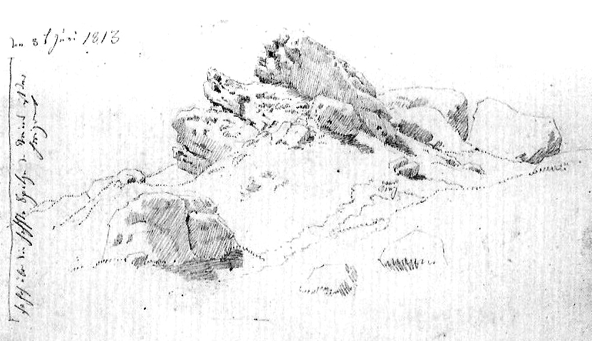 Felsige Kuppe, 3. Juni 1813, Bleistift, 11,1 x 18,6 cm, Inschrift linke Seite, hochkant: "so hoch über die höchste Spitze des Steines ist der Horizont"